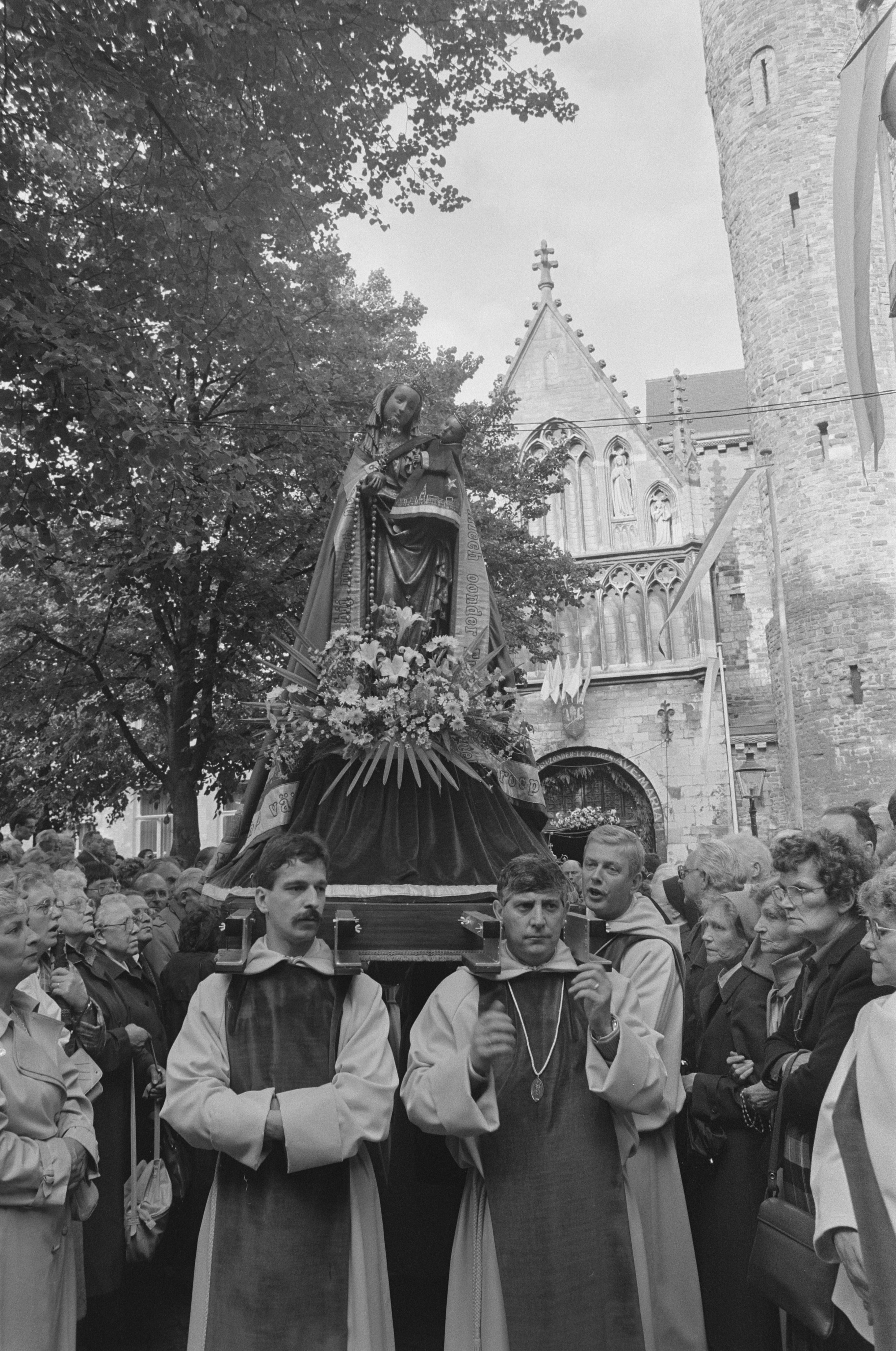 Collectie / Archief : Fotocollectie Anefo Reportage / Serie : [ onbekend ] Beschrijving : Gebedsdienst Paus Johannes Paulus II op groot projectiescherm voor Onze Lieve Vrouwebasiliek in Maastricht; processie met beeld Sterre der Zee t.g.v opening Mariajaar. Datum : 6 juni 1987 Trefwoorden : Gebedsdiensten Persoonsnaam : Johannes Paulus II (paus), Onze Lieve Vrouwebasiliek Fotograaf : Gerrits, Roland / Anefo Auteursrechthebbende : Nationaal Archief Materiaalsoort : Negatief (zwart/wit) Nummer archiefinventaris : bekijk toegang 2.24.01.05 Bestanddeelnummer : 934-0056